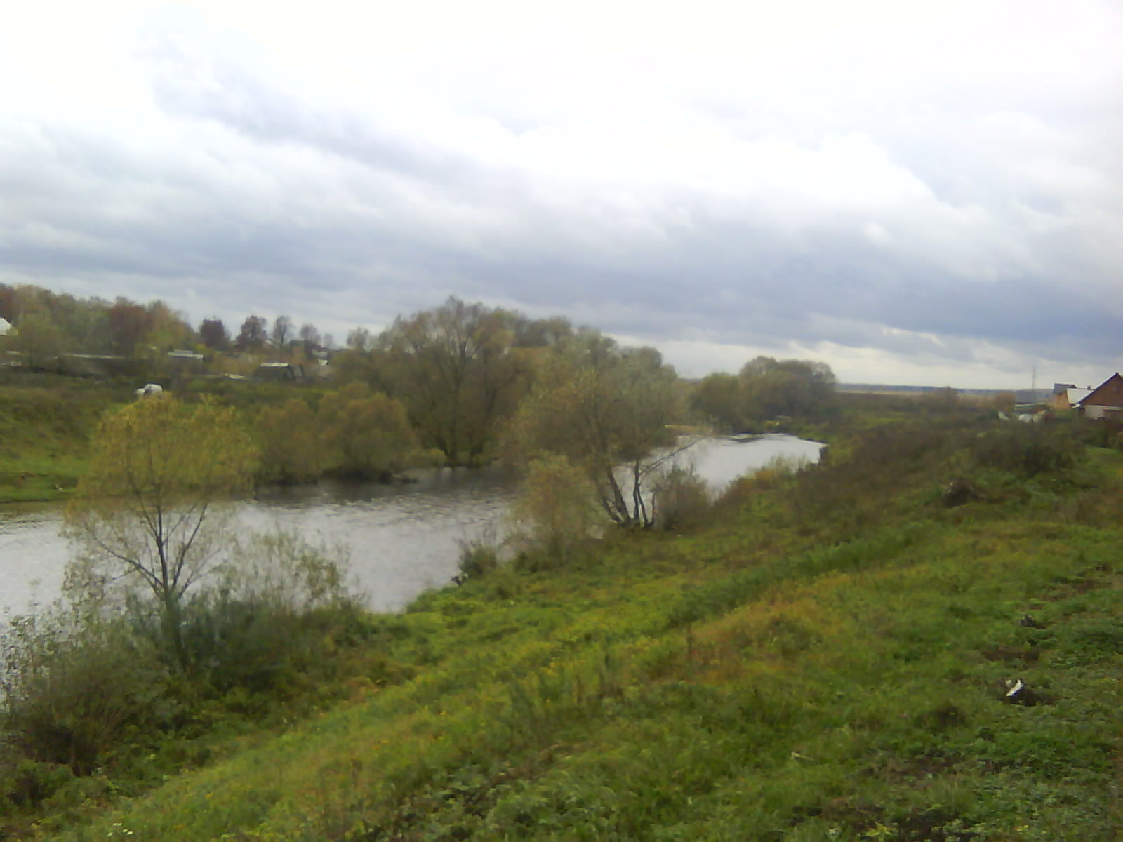 Вид на реку Северку с берега деревни Горностаево